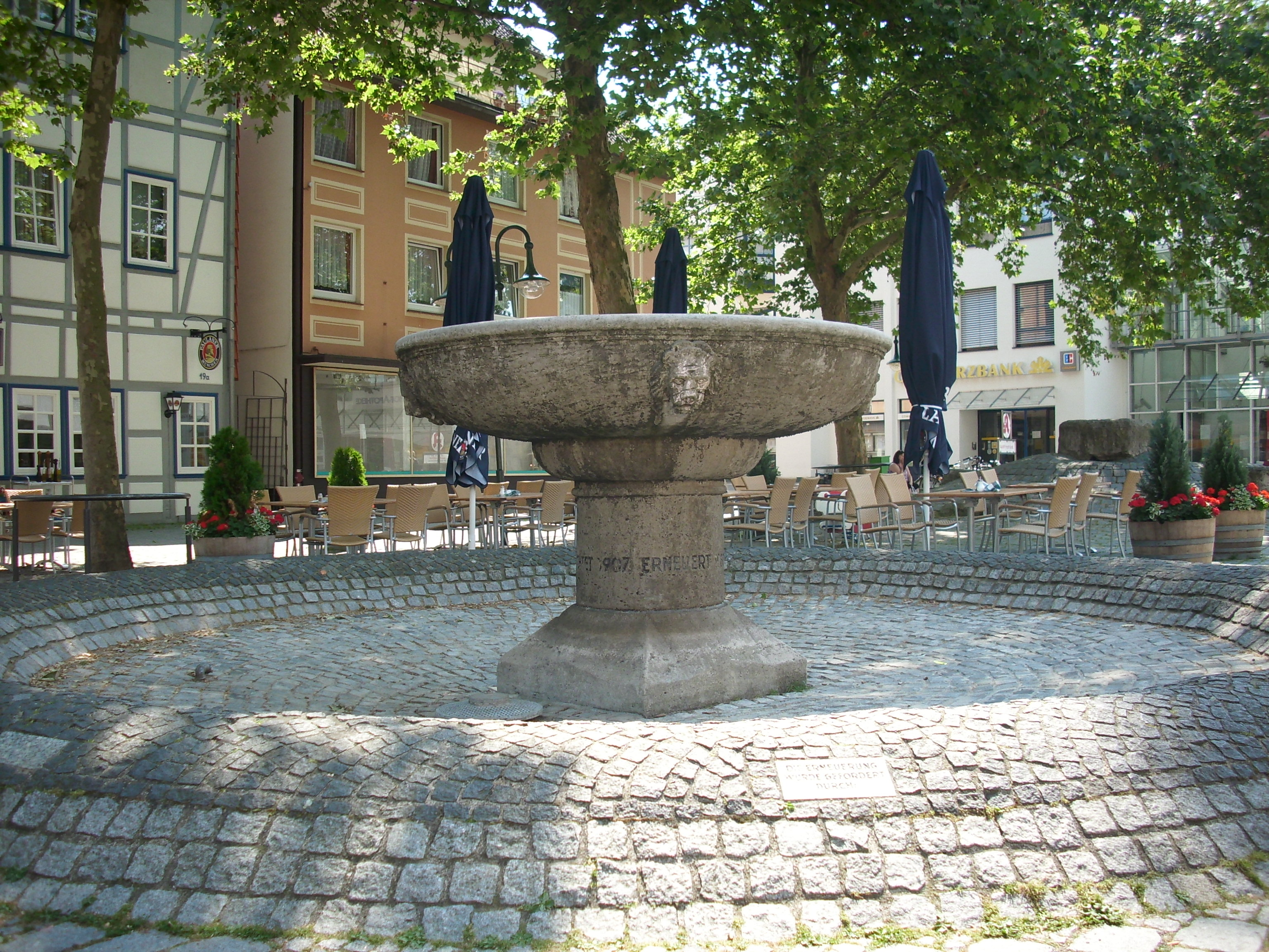 Graf-Otto-Brunnen vor dem City Center.